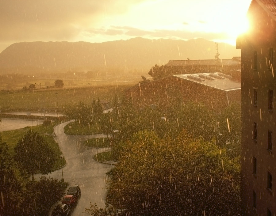 Postojna, pogled na šolski center in Nanos